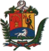 Art. 1° Las armas de Venezuela serán un escudo, cuyo campo llevará los colores del pabellón venezolano en tres cuarteles. El cuartel de la derecha será rojo, y en él se colocará un manojo de mieses, que tendrá tantas espigas cuantas sean las provincias de Venezuela, simbolizándose a la vez la unión de éstas bajo su sistema político y la riqueza de su suelo. El de la izquierda será amarillo y como emblema del triunfo llevará armas y pabellones enlazados con una corona de laurel. El tercer cuartel que ocupará toda la parte inferior será azul y contendrá un caballo indómito blanco, empresa de la Independencia. El escudo tendrá por timbre el emblema de la abundancia que Venezuela había adoptado por divisa, y en la parte inferior una rama de laurel y una palma atadas con giras azules y encarnadas, en que se leerán en letras de oro las inscripciones siguientes: Libertad – 19 de abril de 1810 – 5 de julio de 1811.